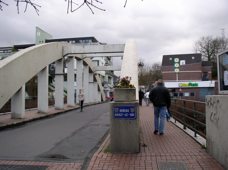 Marly-le-Roi-Brücke in Leichlingen